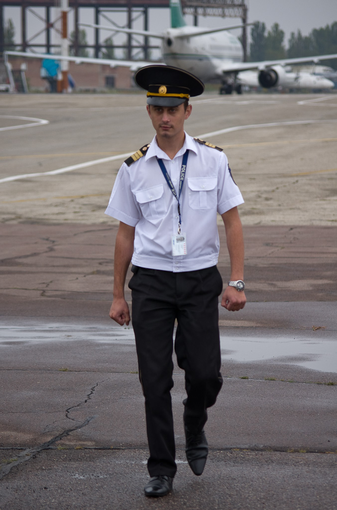 Полицейский (сержант) в аэропорту Кишинёва